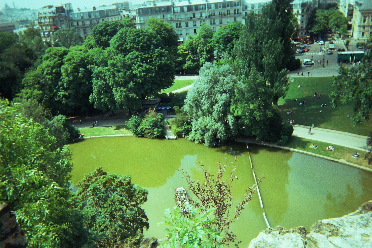 Vu du lac des buttes chaumons vu du Temple de la Sybille dont on voit l'accès à l'escalier sur le coté, Photos Prise le 10-07-2006 Par Benjeremie.